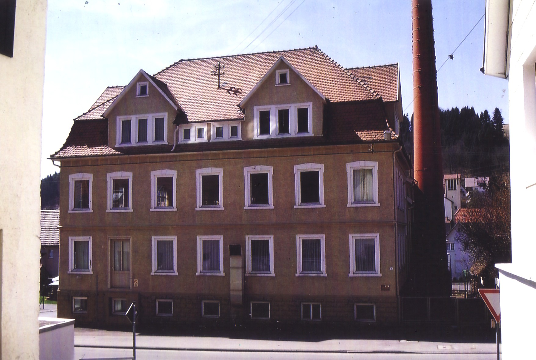 Der von dem Firmengründer Johannes Hakenmüller 1899 in Albstadt-Onstmettingen erbaute Zweigbetrieb, welcher 1920 an den Textilfabrikanten Johannes Drescher verkauft wurde.